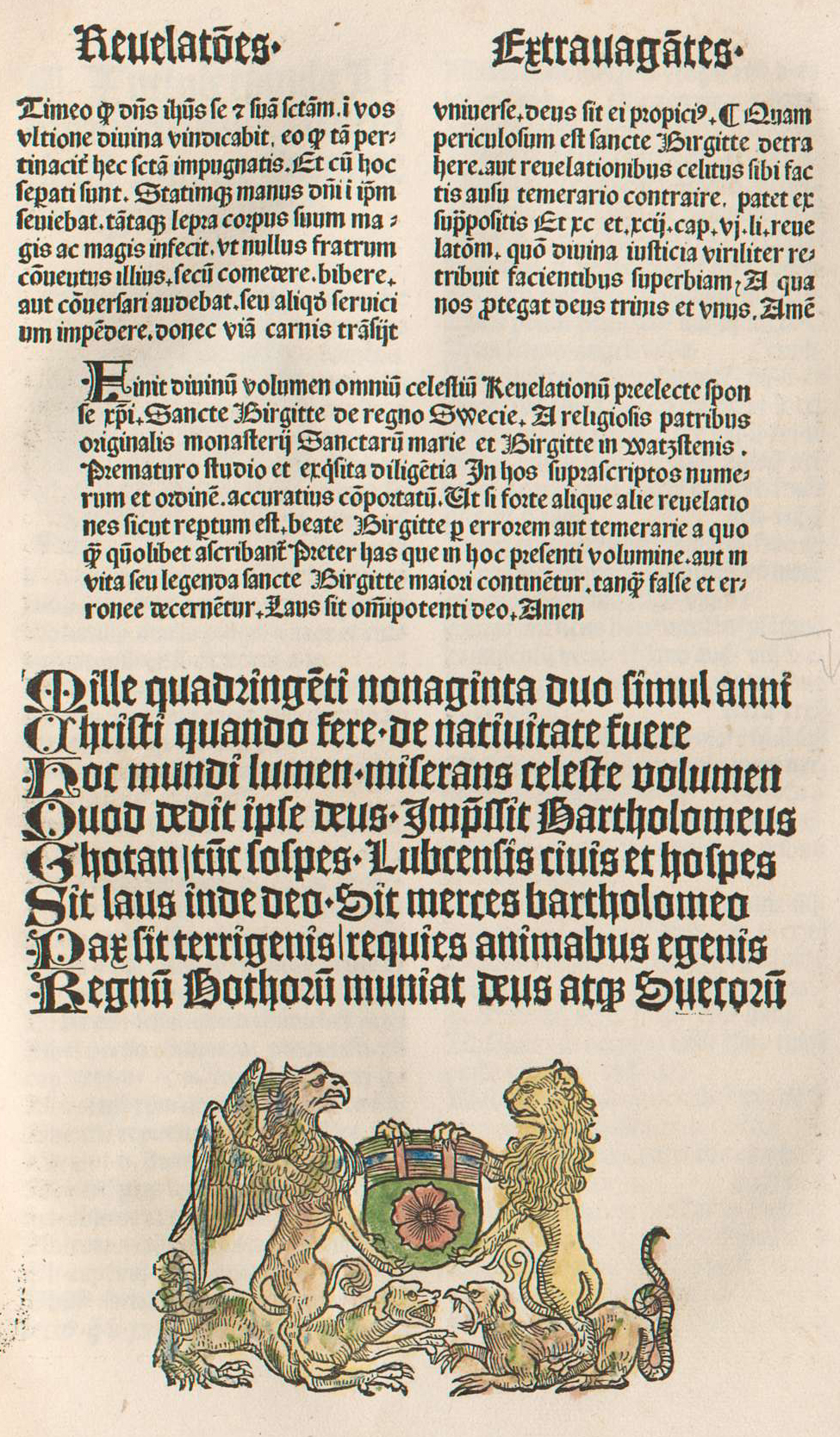 Kolophon